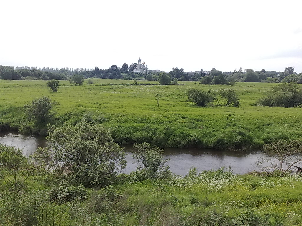 Sara River in Sknyatinovo, Yaroslavl Oblast